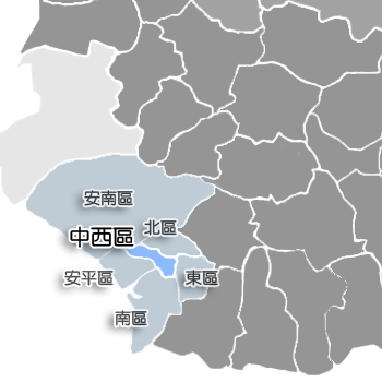 中西區相對位置。